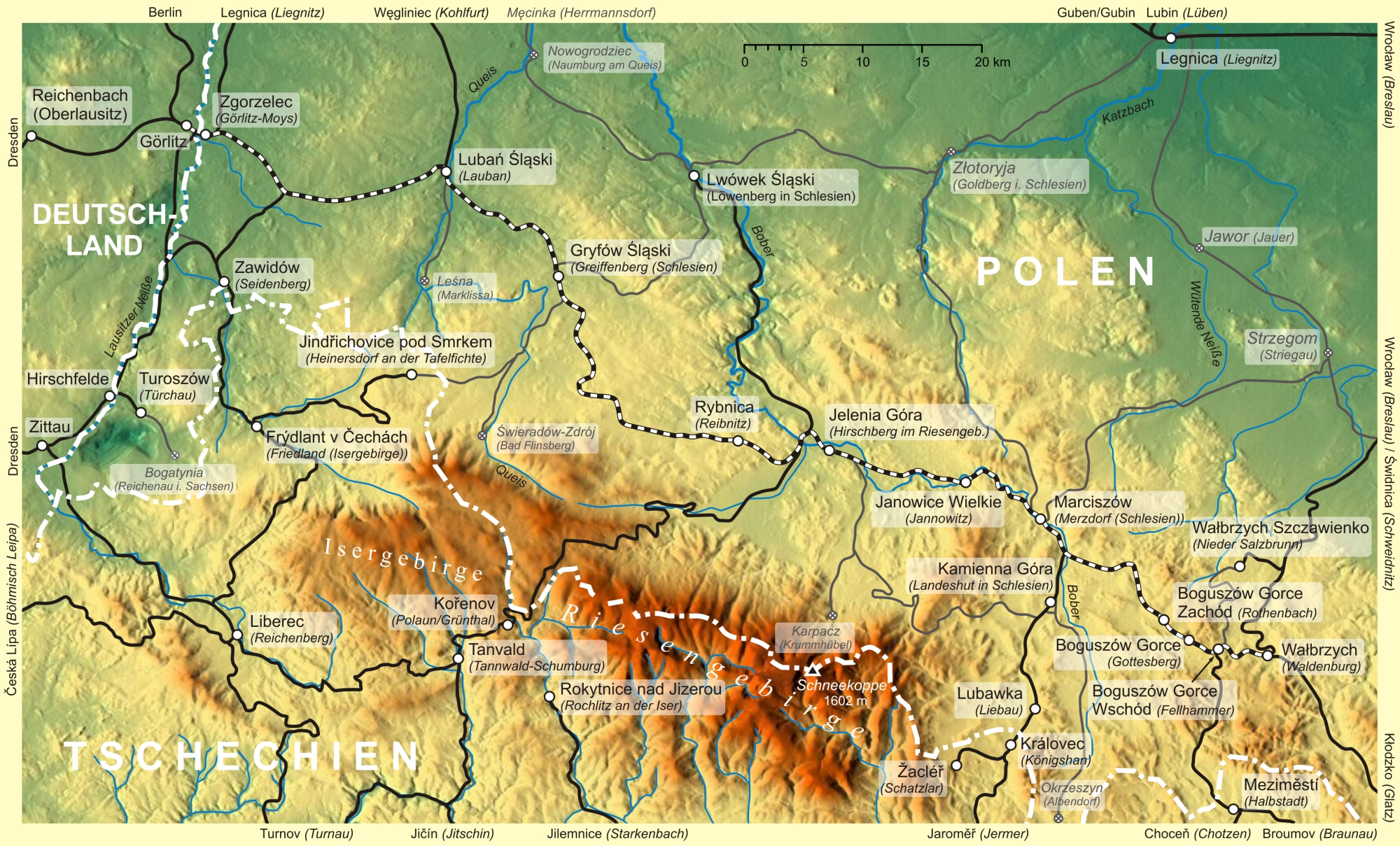 Verlaufskarte der Schlesischen Gebirgsbahn